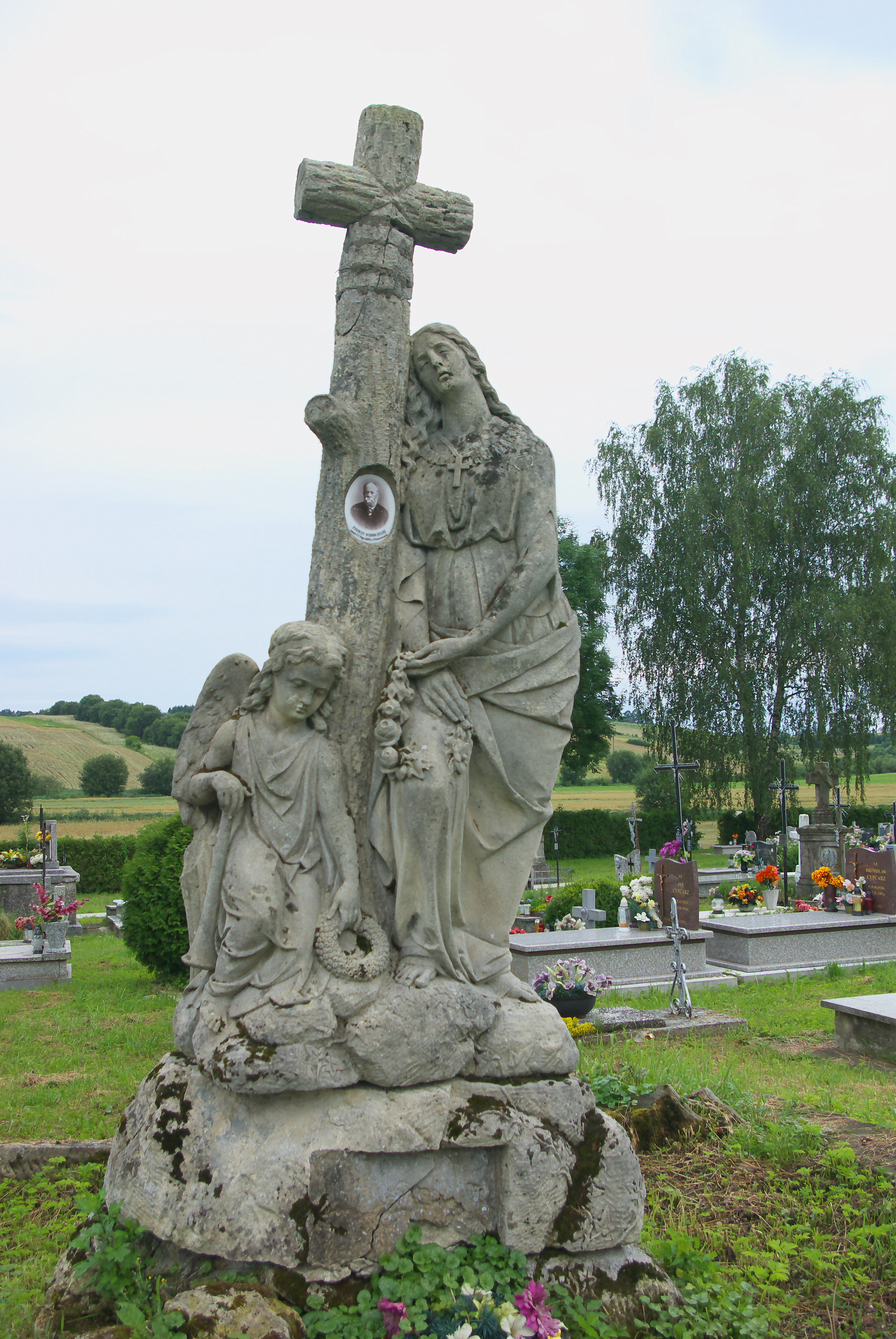 Nagrobek Zygmunta Ścibor-Rylskiego w Dudyńcach.